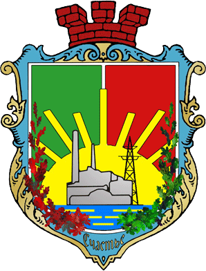 Герб міста Щастя